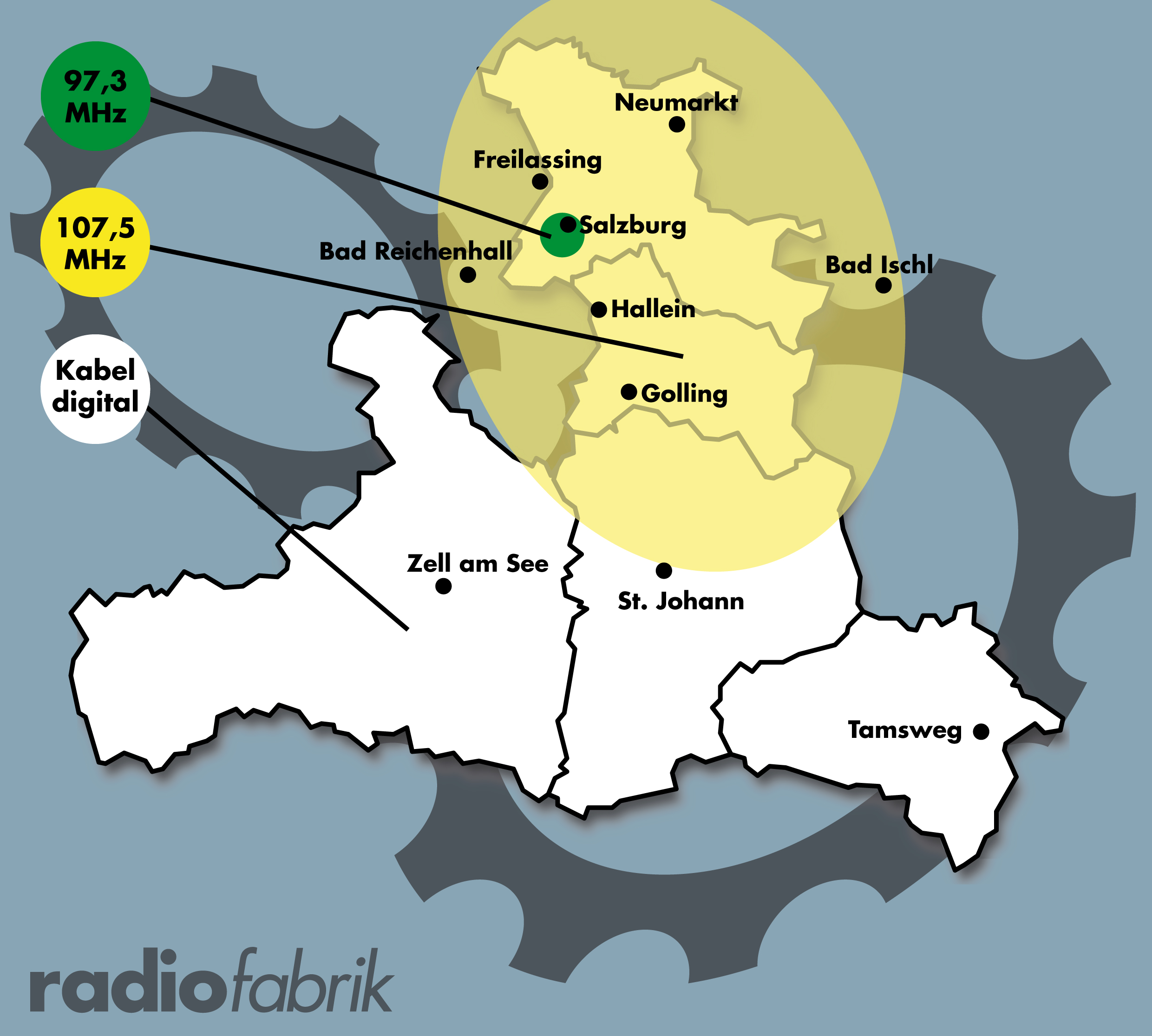 Broadcast area Radiofabrik Broadcast area Radiofabrik